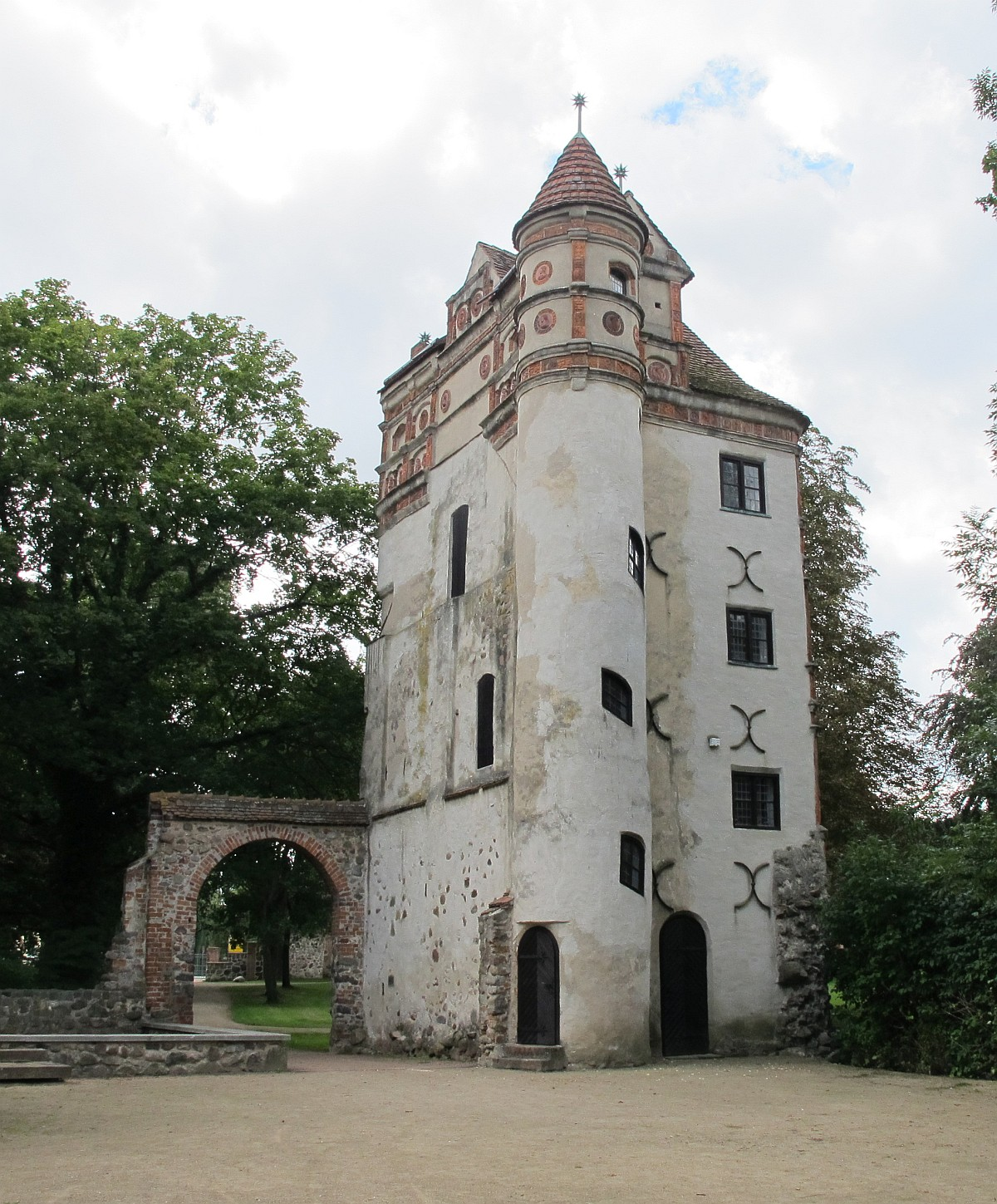 Burg Freyenstein in Brandenburg, Deutschland